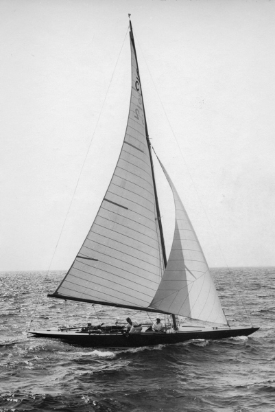 6m R-yachten Tutti V. 27 juni 1927. Konstruktör Gustaf Estlander. Båten köpt 1930 av Sven Salén och av denne omdöpt till May Be II.